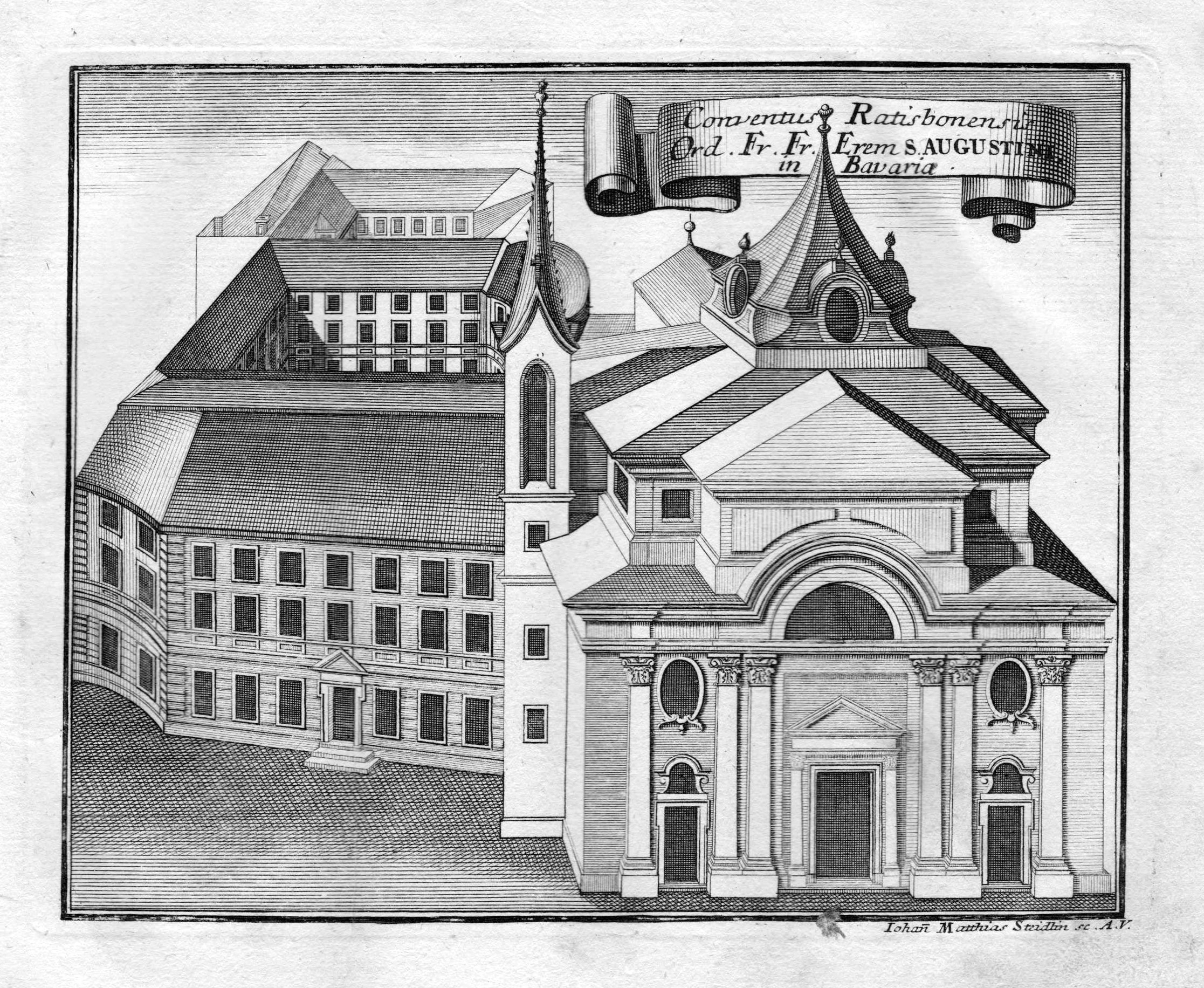 Kupferstich - Ehemaliges Augustinerkloster Regensburg